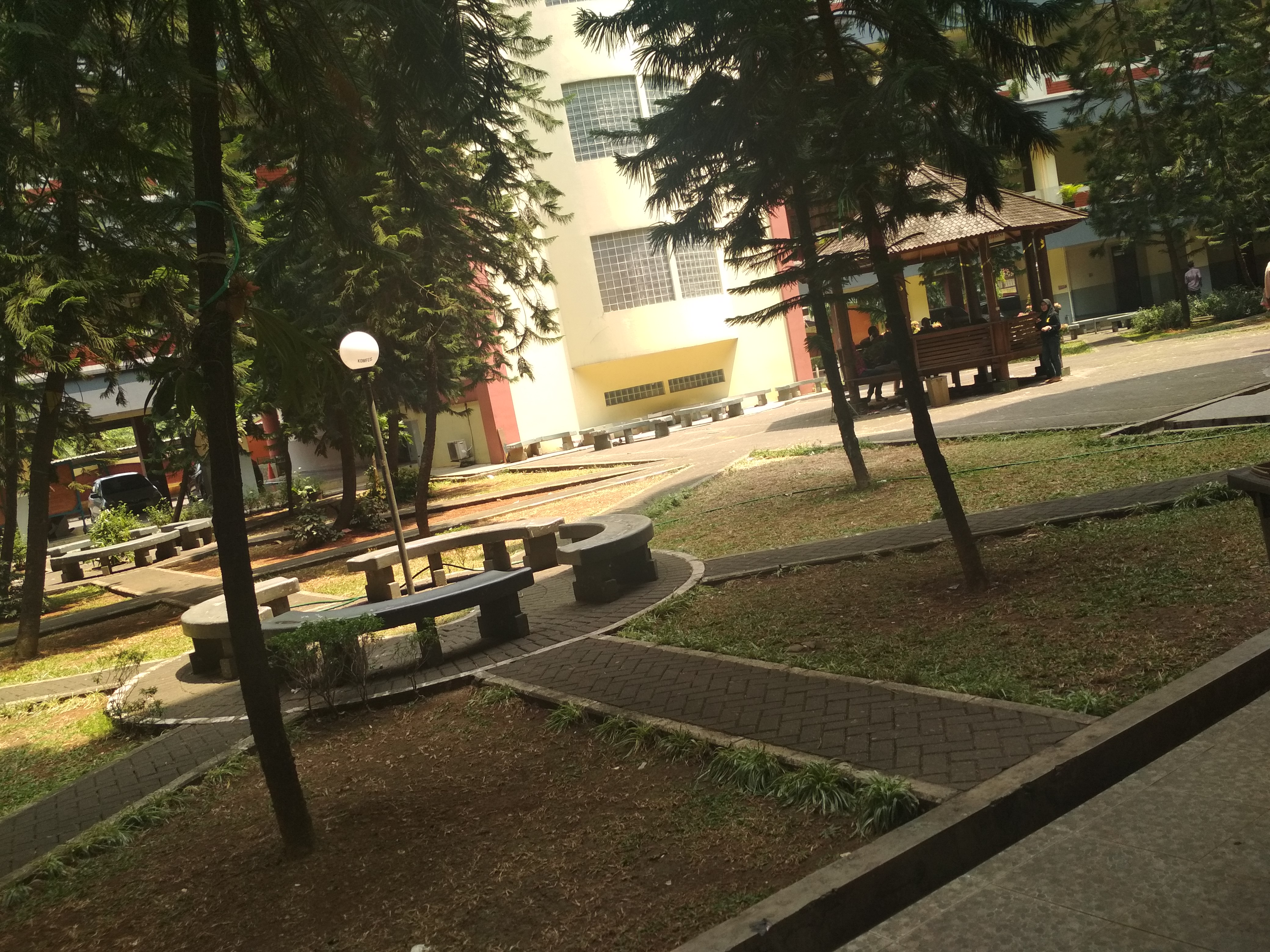 Taman